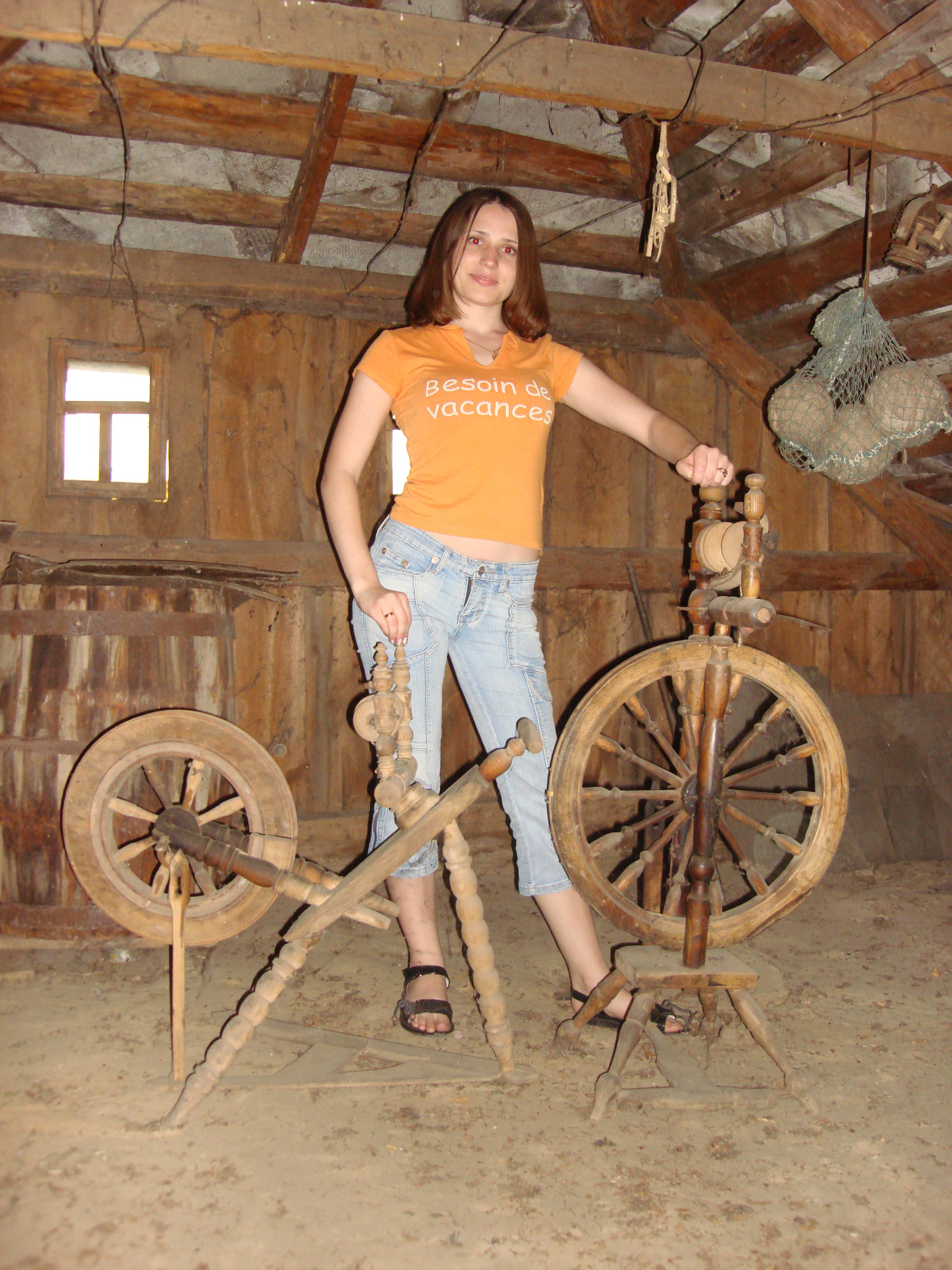 Прялки_с.Сингаї_Коростенського_району